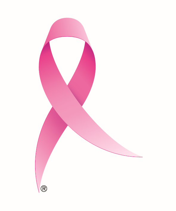 Logo Rosa sløyfe i Norge. Denne er beskyttet og varemerkeregistrert. Kan kun brukes etter avtale med Kreftforeningen